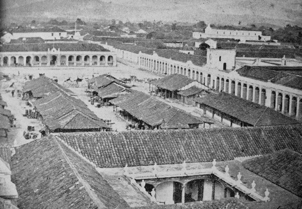 Plaza de Armas de Guatemala en la década de 1870.